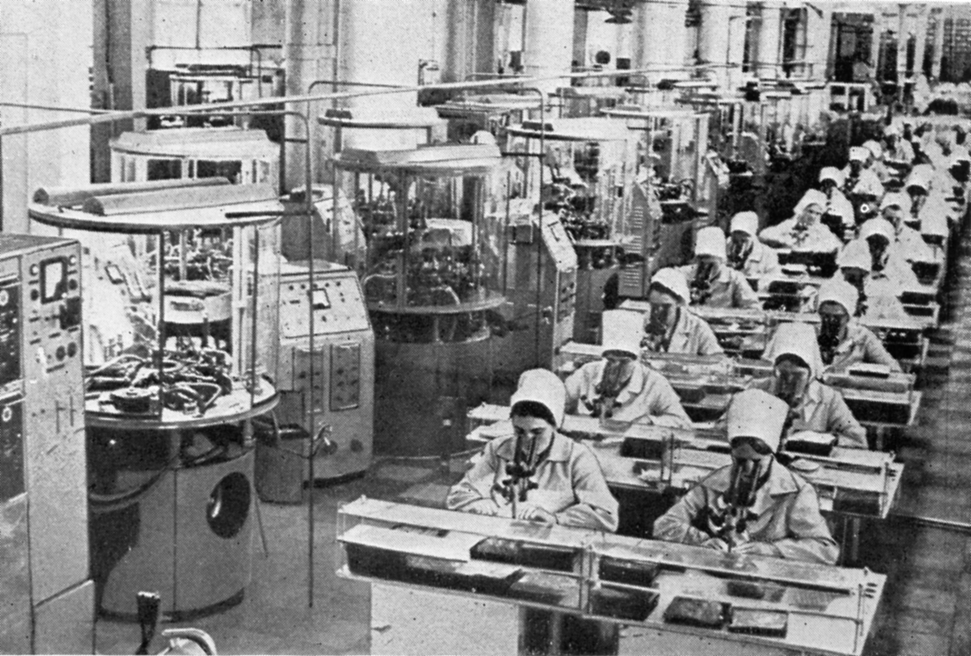 На заводе имени Ленинского комсомола 1975г.